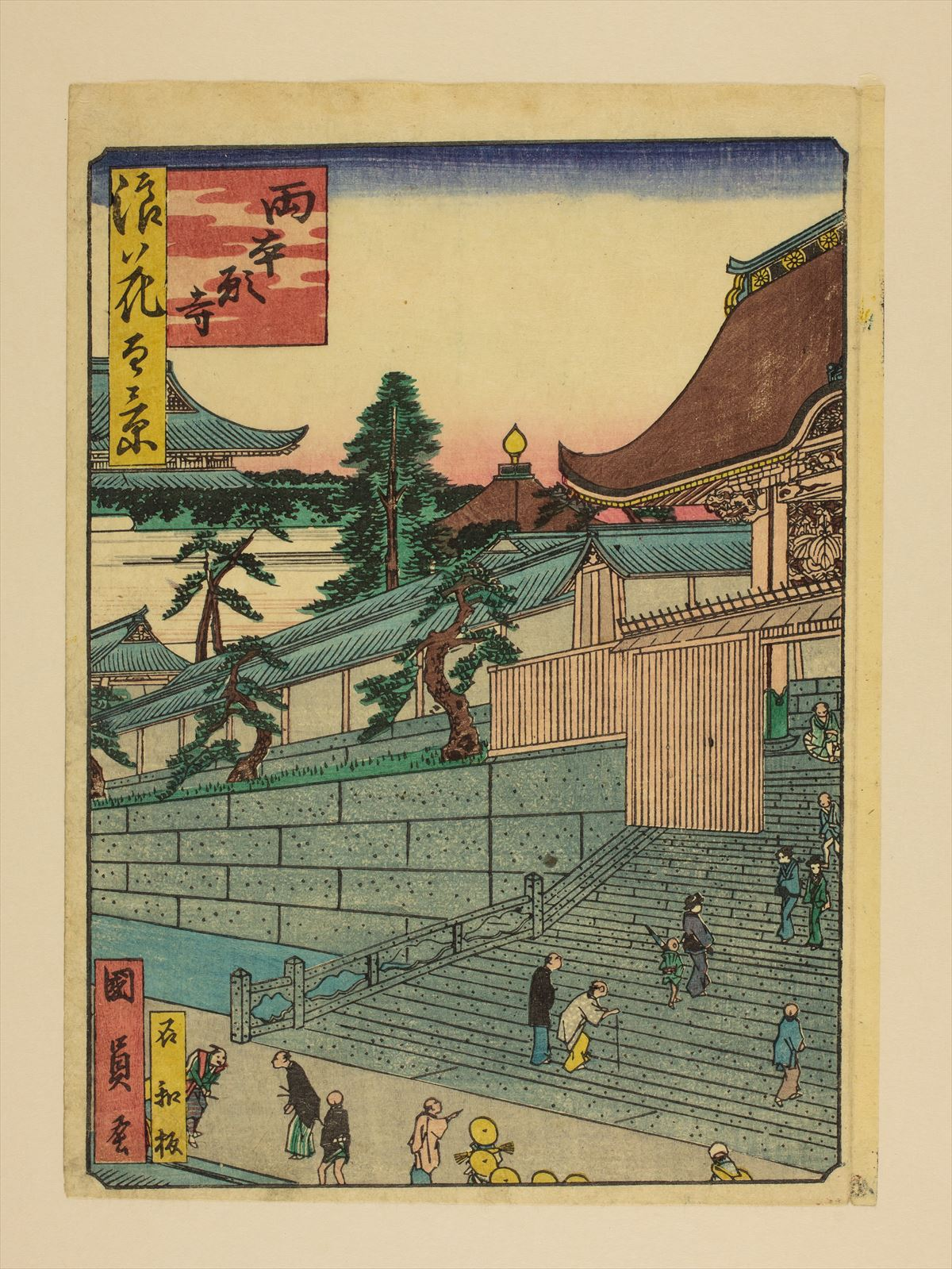 1800年代。歌川國員/画。浪花百景 102枚のうちの1枚。大阪市立中央図書館蔵。